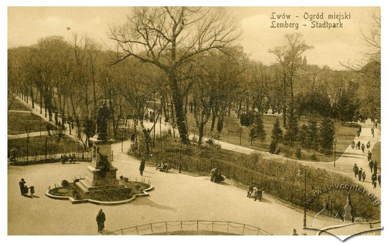 Park Kościuszki we Lwowie, znany także jako Ogród Jezuicki. Nazwa współczesna Park Iwana Franki